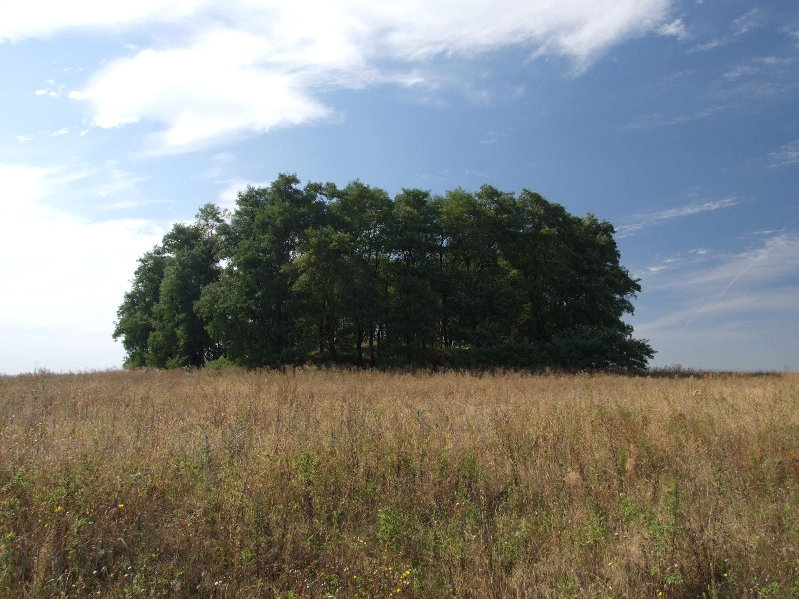 Могила соратника Богдана Хмельницького Данила Нечая. Курган.